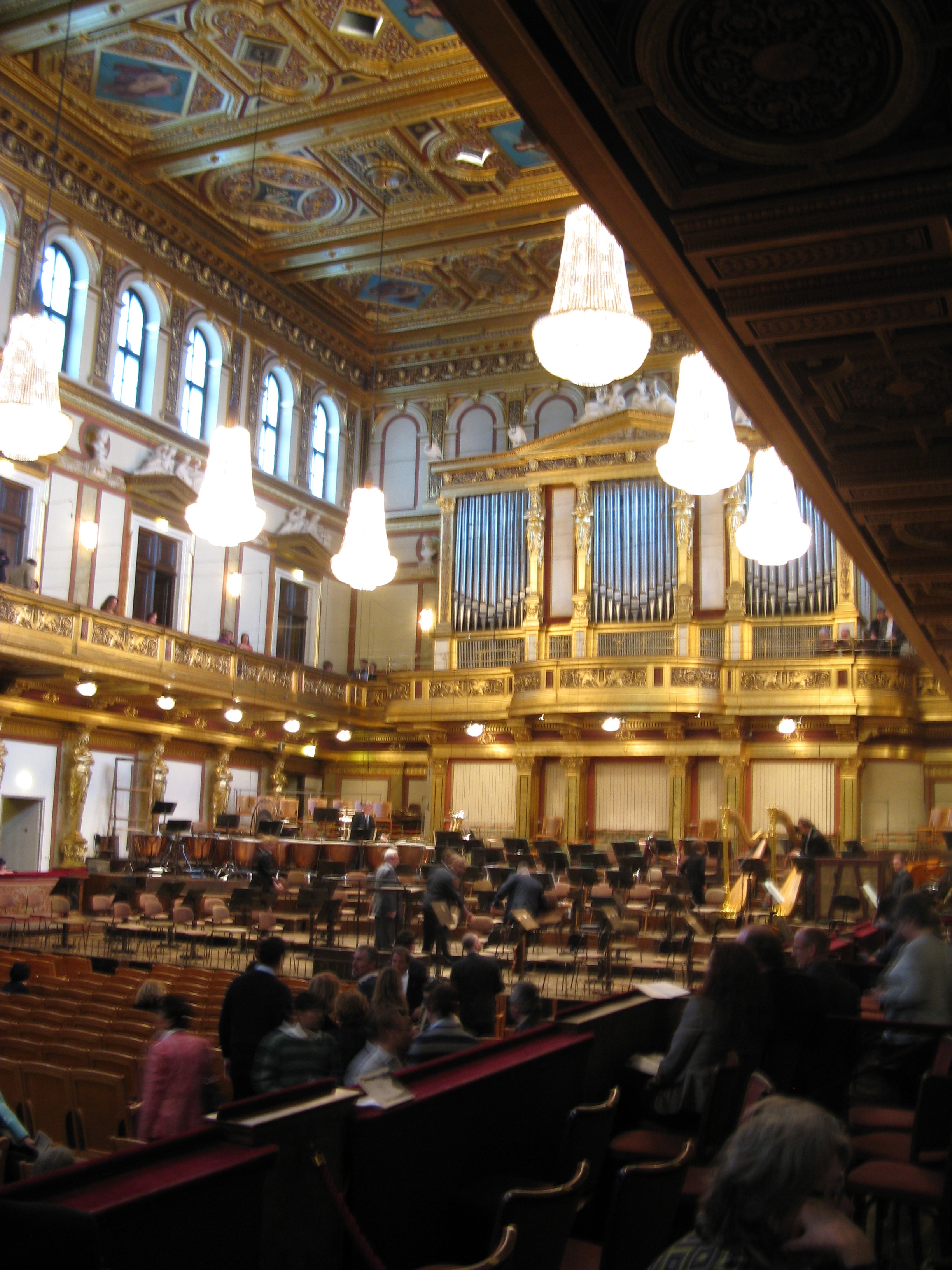 Musikverein, Vienna